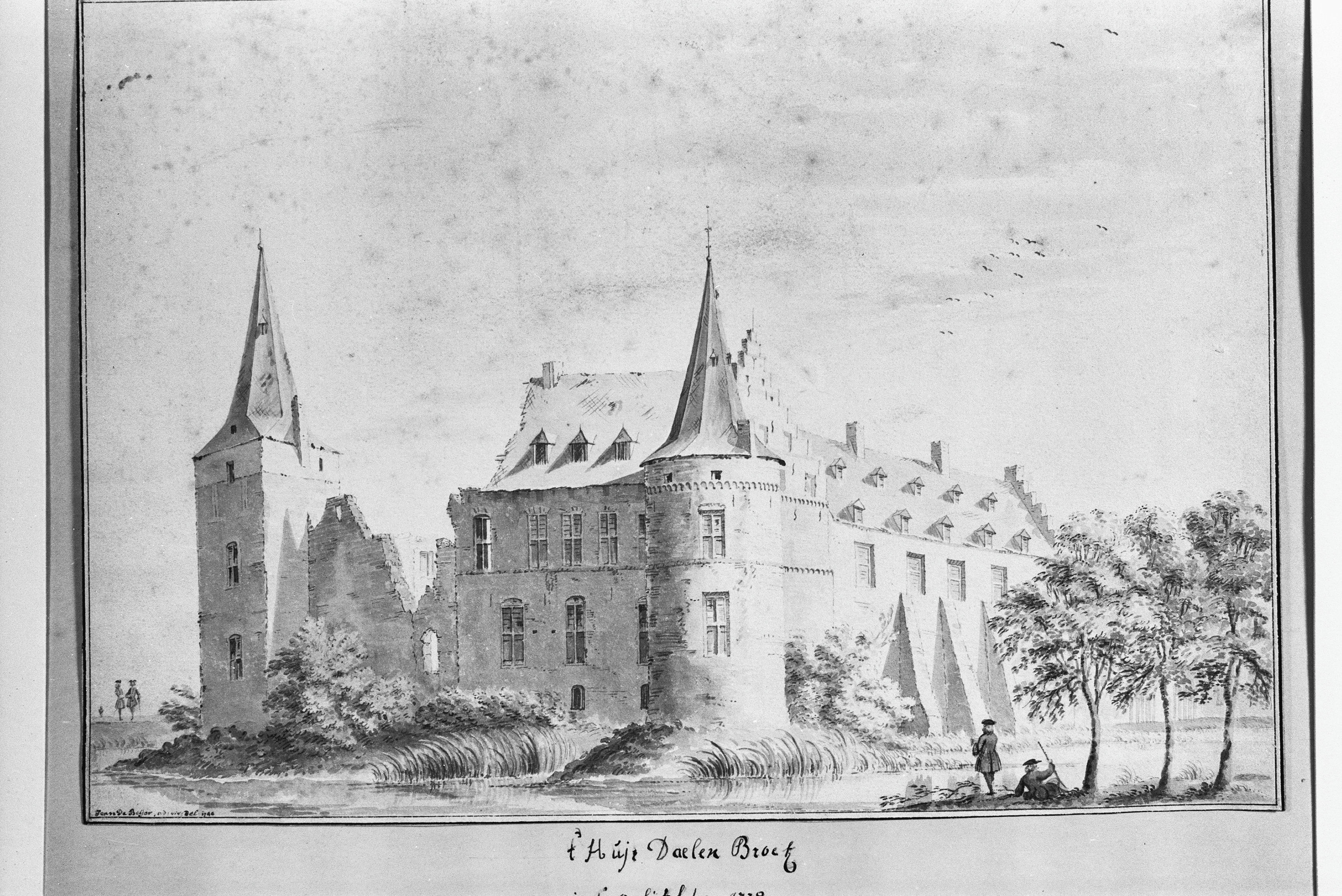 Kasteel Daelenbroeck: tekening van J.de Beyer, 1738